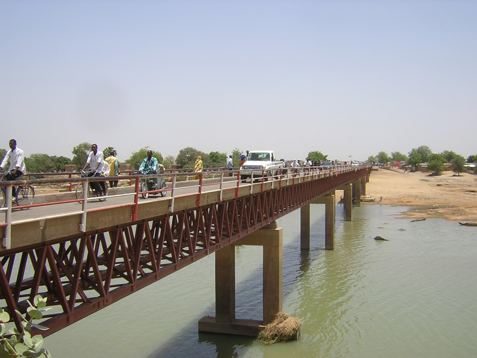 Staatsgrenze, Brücke über den Logone-Fluss, bzw. Schari-Fluss zwischen Kousséri im nördlichen (Kamerun) und der Hauptstadt Ndjamena des Tschads, die sich bis 1973 Fort Lamy nannt, nach dem französischen Kolonialist und Offizier François Joseph Amédée Lamy (1858-1900), gefallen in der Schlacht bei Kousséri